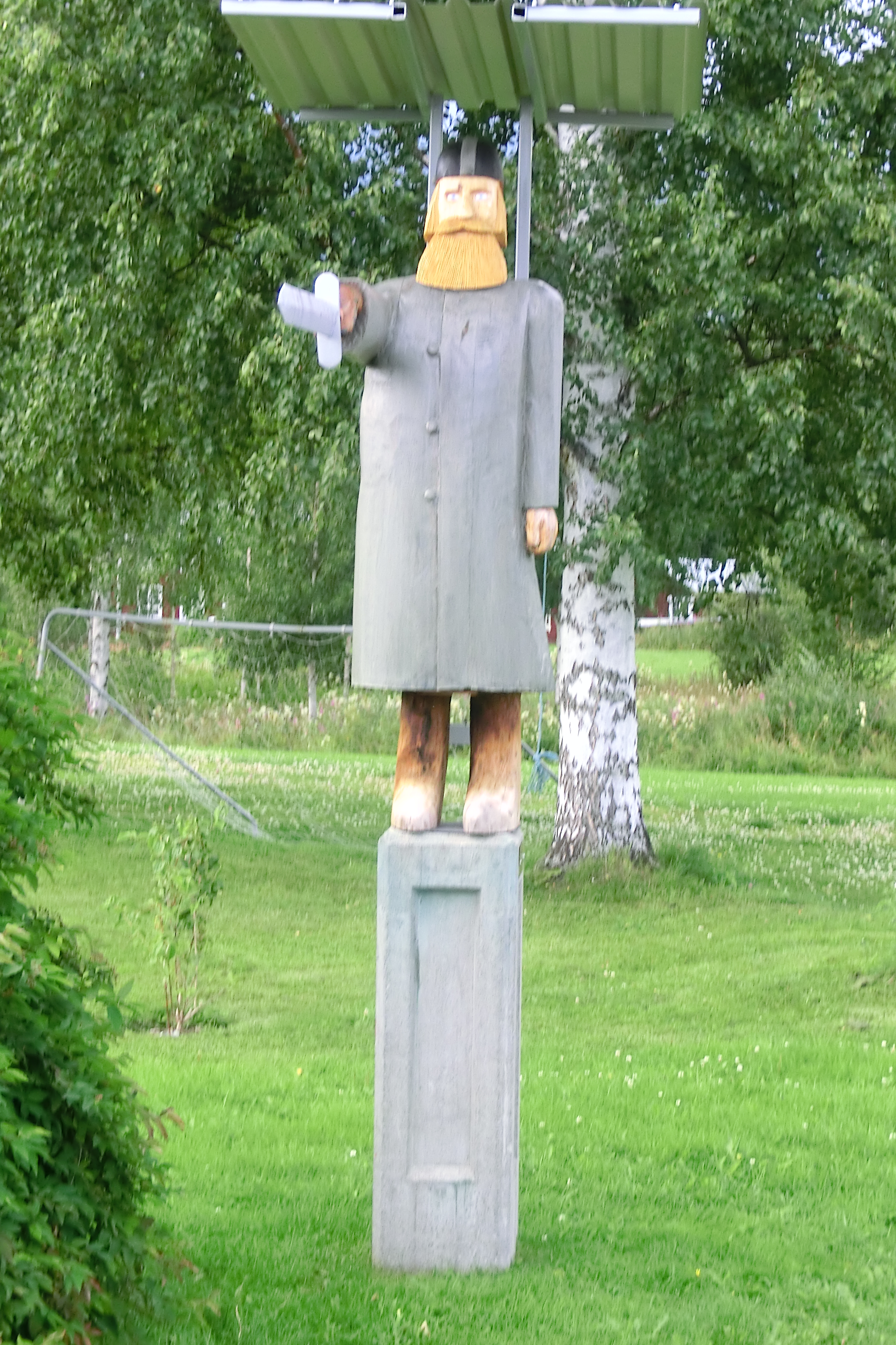 Statyn av Skule Tostesson vid Haverö kyrka